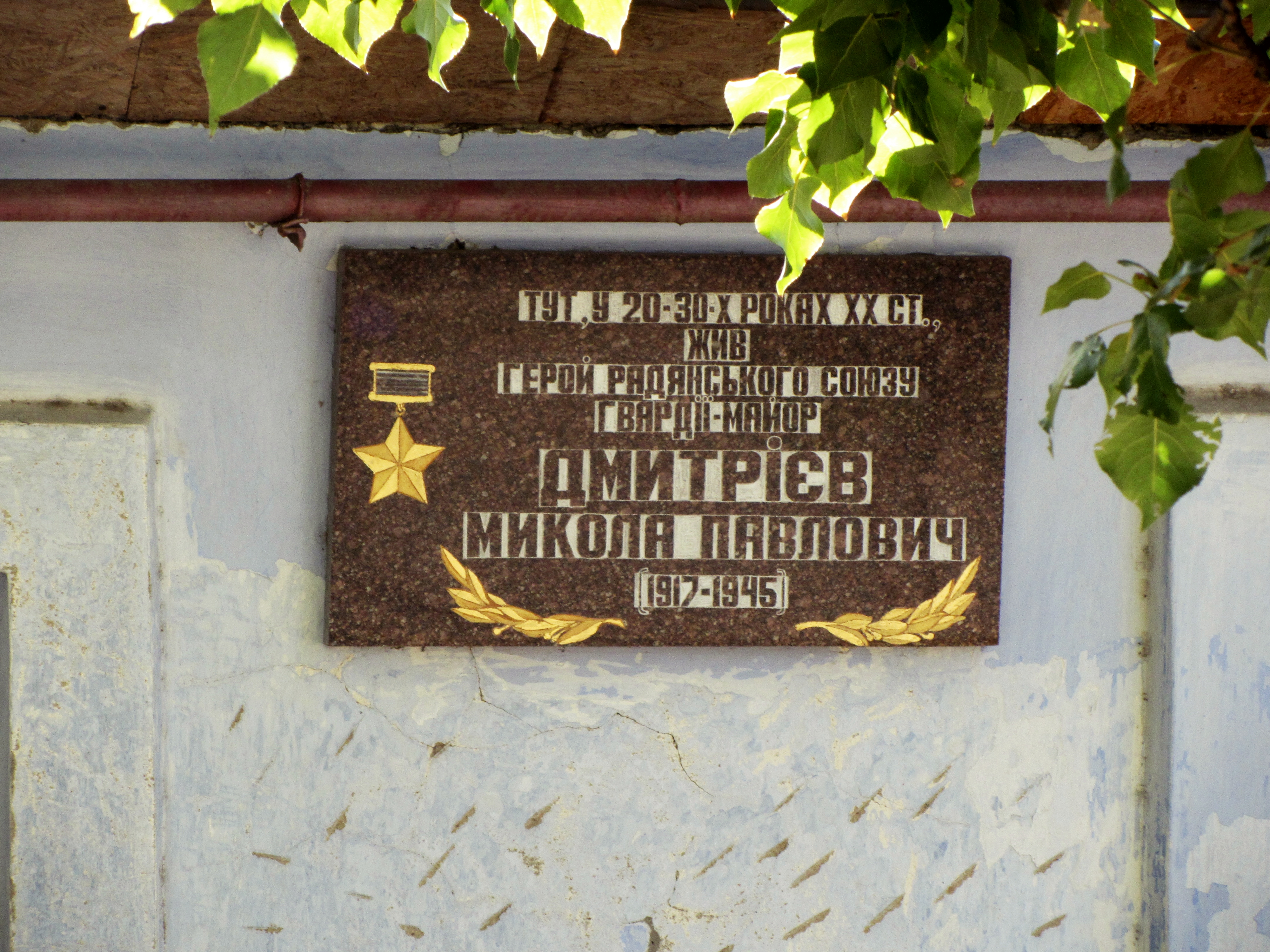 Будинок, в якому у 20-30-ті роки XX ст. мешкав Герой Радянського Союзу М.П.Дмитрієв 1941 -1945 рр., Миколаїв, вул. Дмитрієва, 47